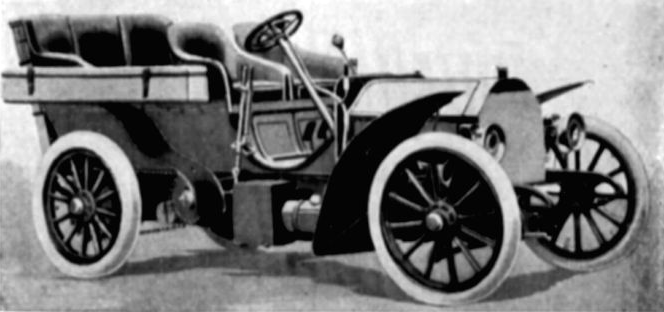 Tourenwagen »Mercedes-Simplex«, Daimler; 10-30 pferdiger Benzinmotor, stündlich bis 80 km